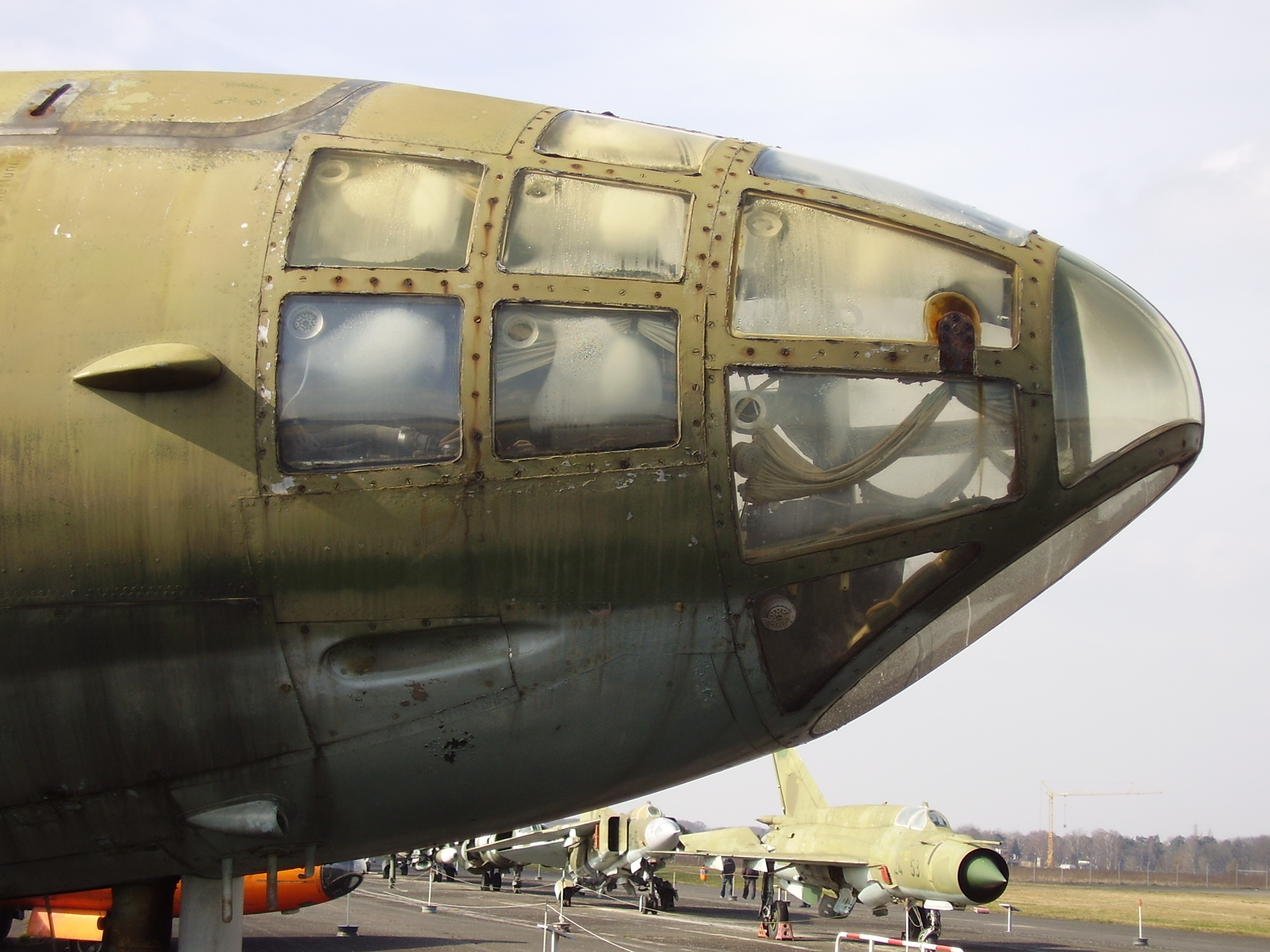 Luftwaffenmuseum der Bundeswehr; Airforce Museum of the Bundeswehr; Berlin-Gatow